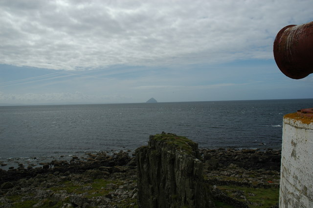 Pladda nr Arran, Scotland, looking to Ailsa Craig